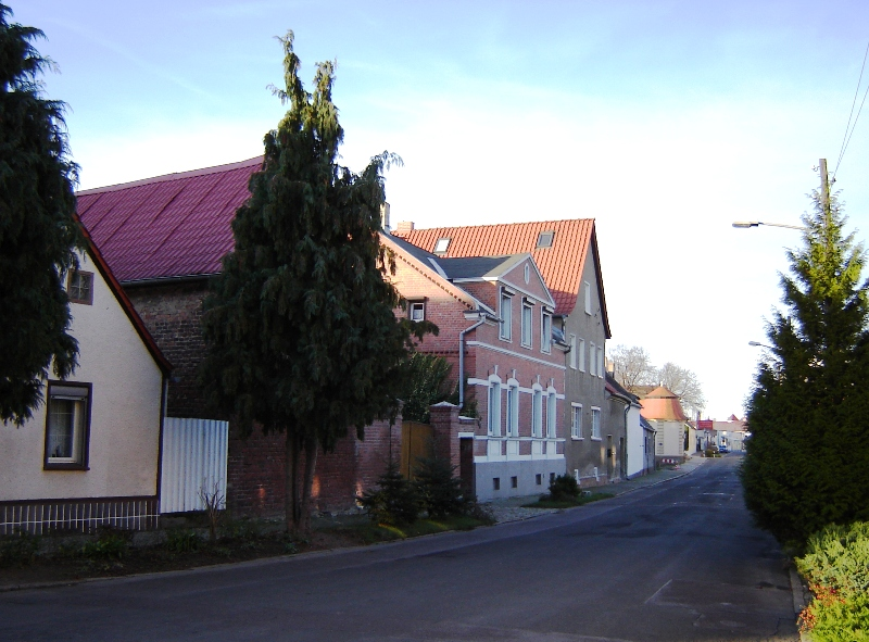 Straßenansicht Magdeburg-Prester